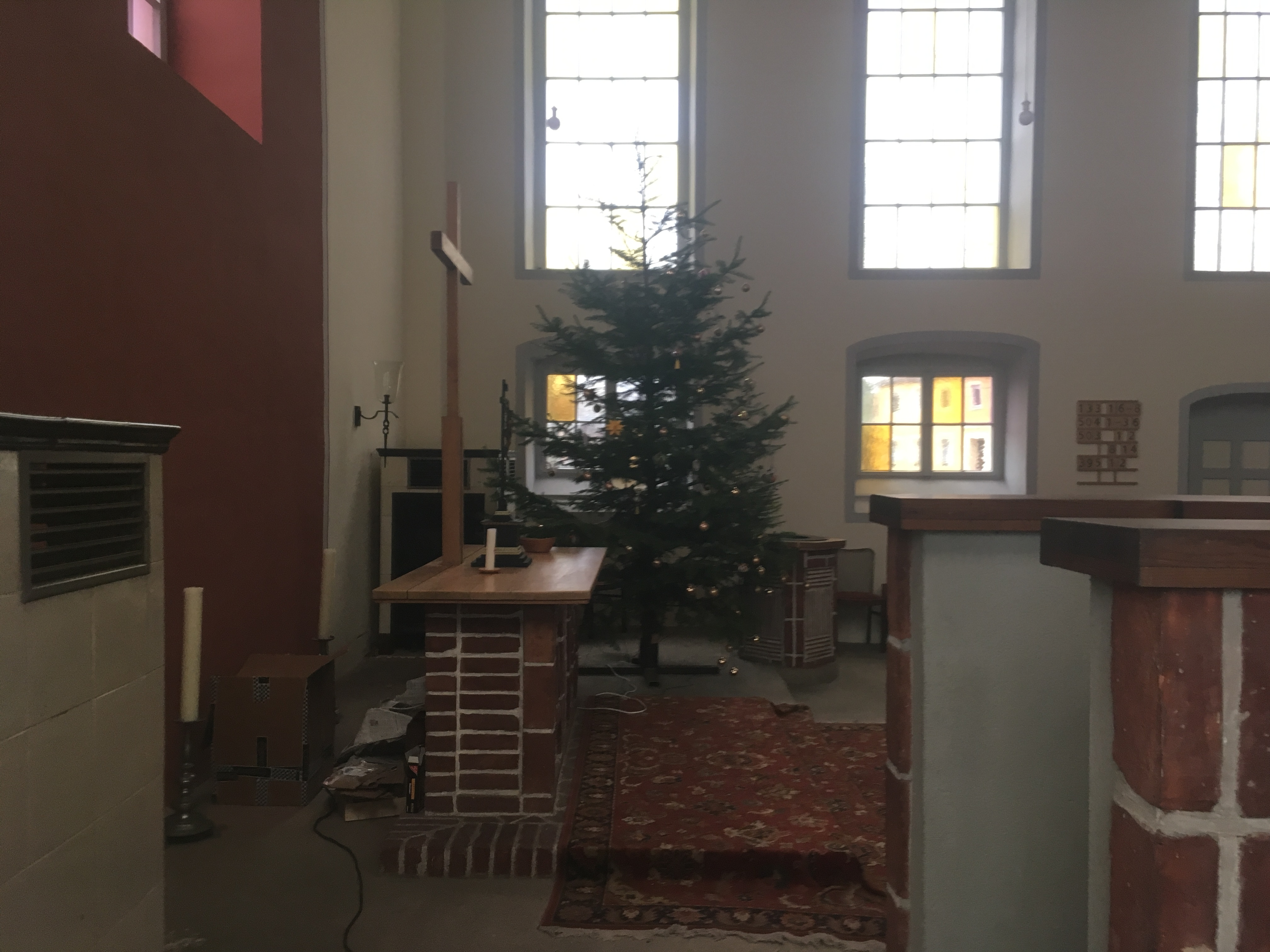 Die Dorfkirche Schöneweide der Gemeinde Nuthe-Urstromtal wurde im Jahr 1753 errichtet und brannte im Zweiten Weltkrieg im Jahr 1945 aus. 1954 ließ die Kirchengemeinde das Bauwerk restaurieren. Die Kirchenausstattung ist einheitlich modern.